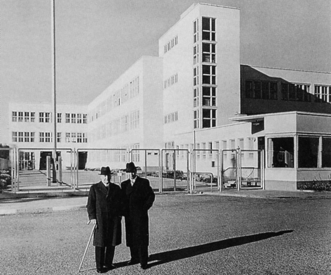 LM Ericssons nya anläggning i Midsommarkransen, Stockholm. Arkitekt Ture Wennerholm står till höger med Hans Theobald Holm, dåvarande VD för Ericsson.